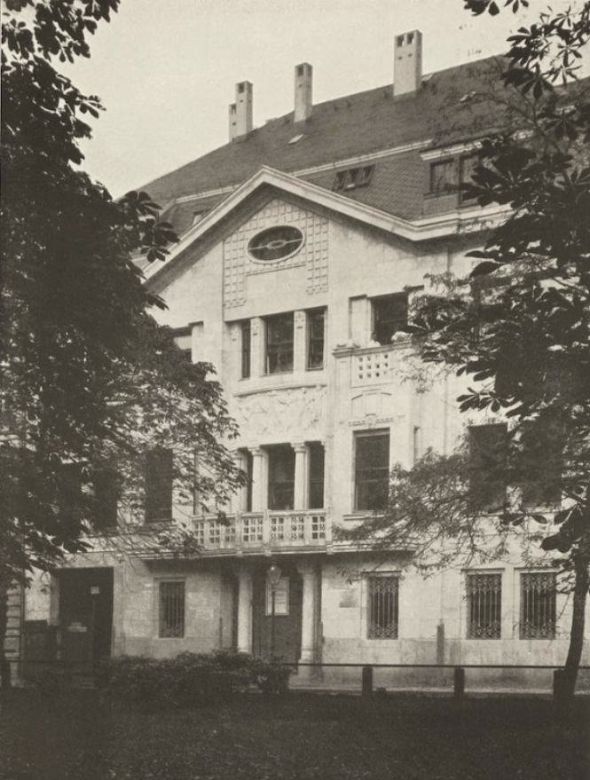 Einfamilienhaus des Herrn Dr. Friedrichs in Düsseldorf, Jägerhofstraße 19-20, Architekt Ludwig H. Fettweis (Abb. von 1910)